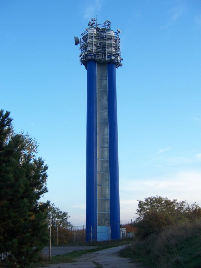 Vodárenská věž Dívčí hrady v Praze-Radlicích